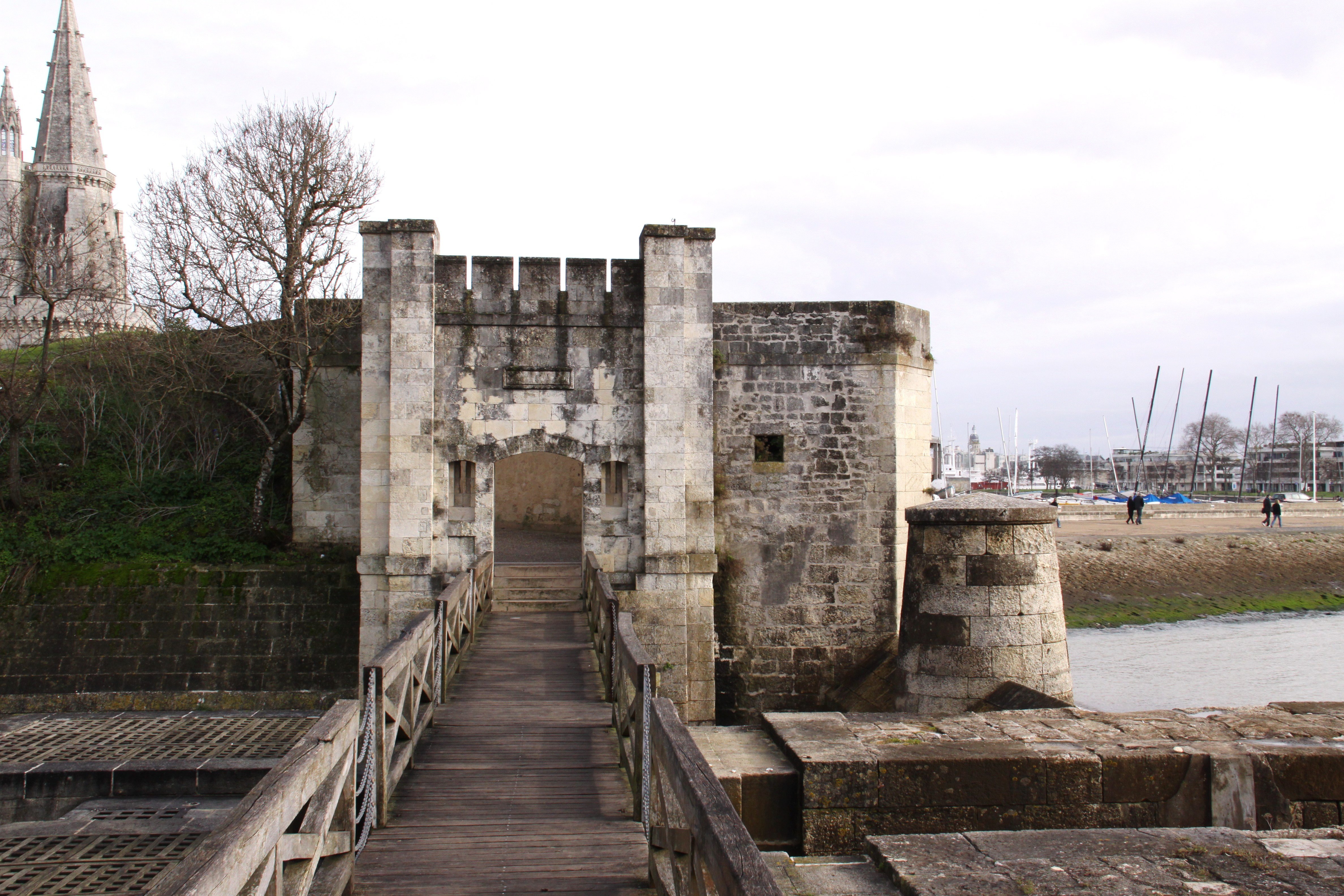 La porte des Deux-Moulins est un ouvrage d' entrée (une redoute) dans l'enceinte médiévale. Deux moulins à marée avaient été élevés à proximité (d' où le nom de la porte). La porte actuelle date du début du 18e siècle. La première avait été construite vers 1200. La Rochelle, Charente Maritime, France.